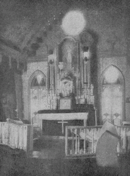 Беларуская (тарашкевіца): Капліца ў Замосьці